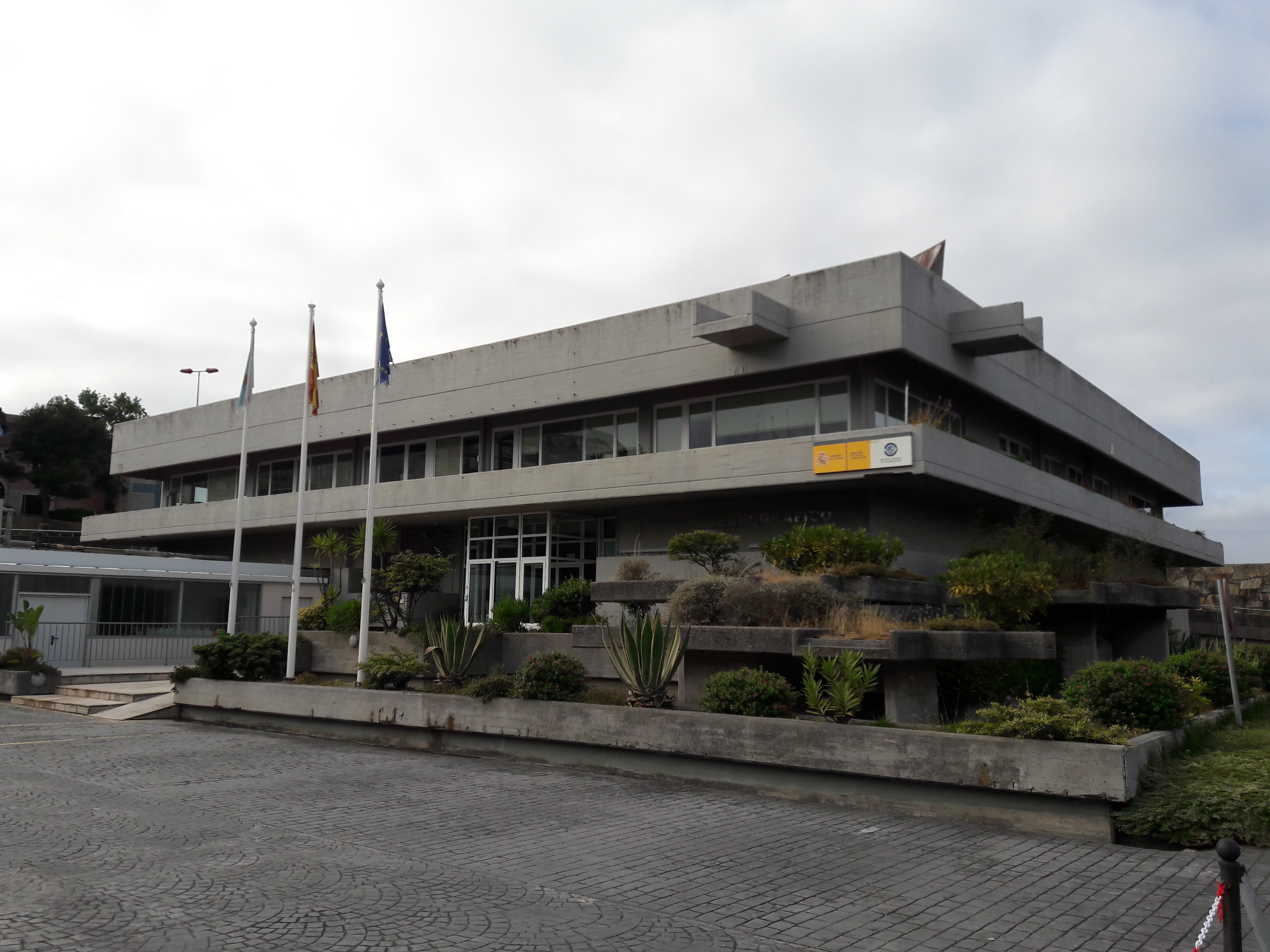 Fachada do Centro Oceanográfico da Coruña